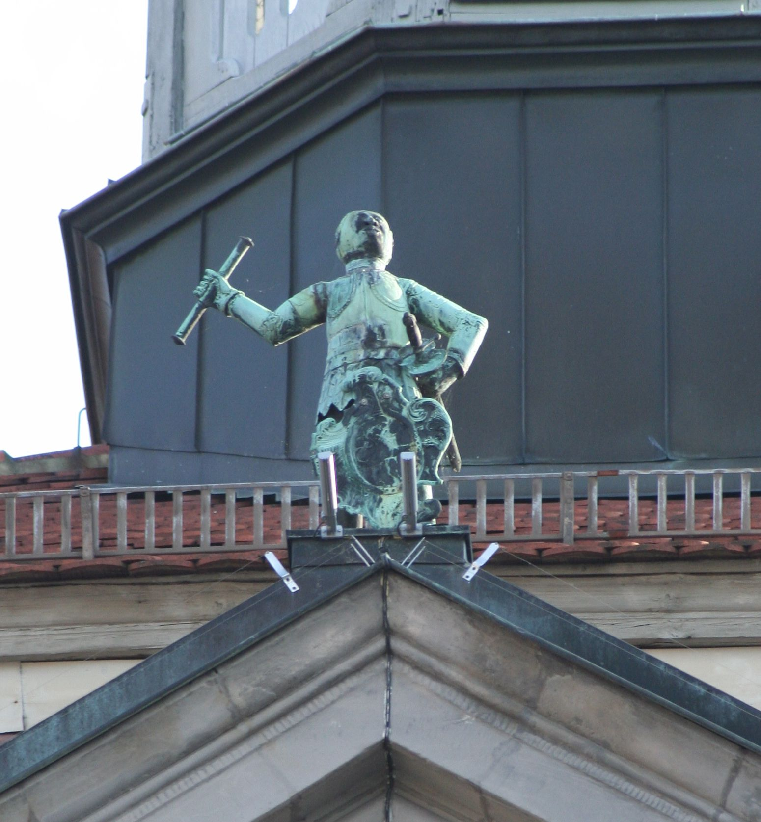 Rathaus, am Markt 1 in Coburg; Bratwurstmännle